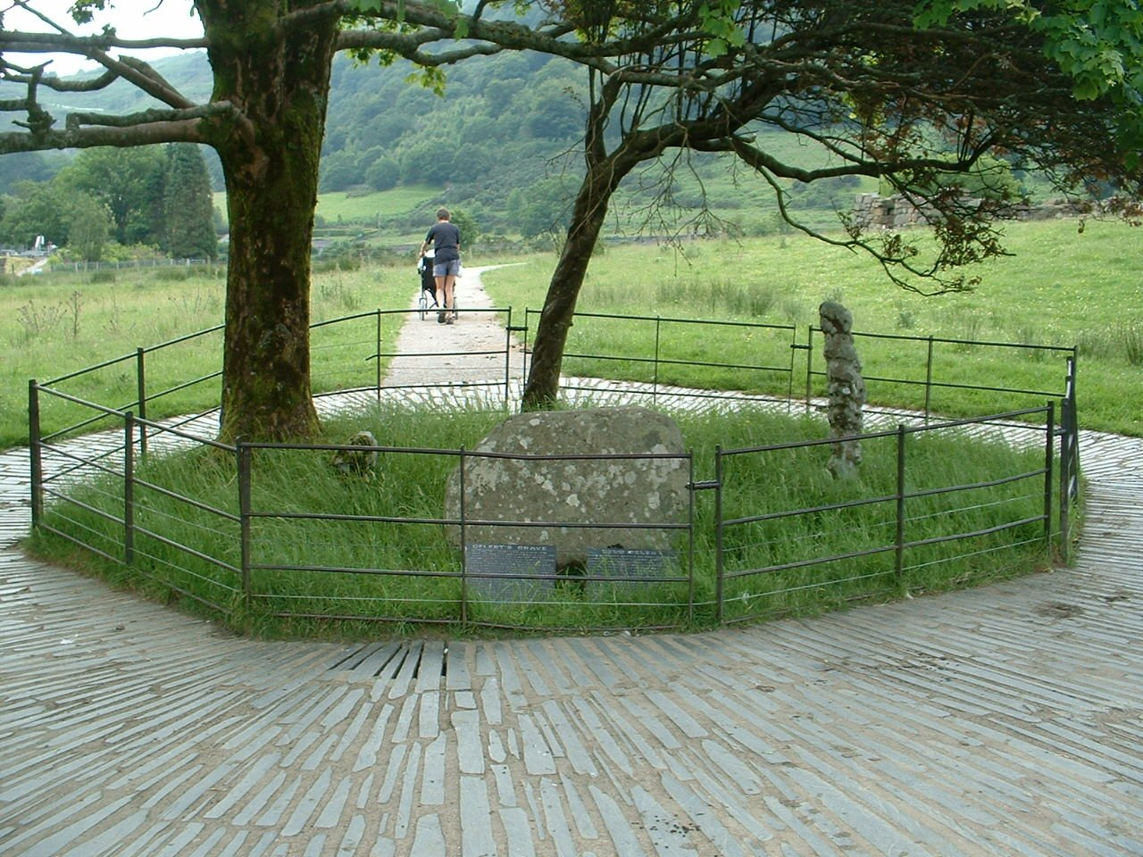 Gelert's Grave, Beddgelert, Gwynedd, Wales